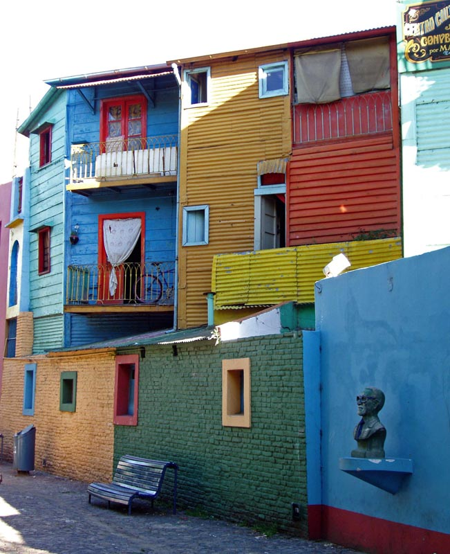 La Boca, Buenos Aires. 2004